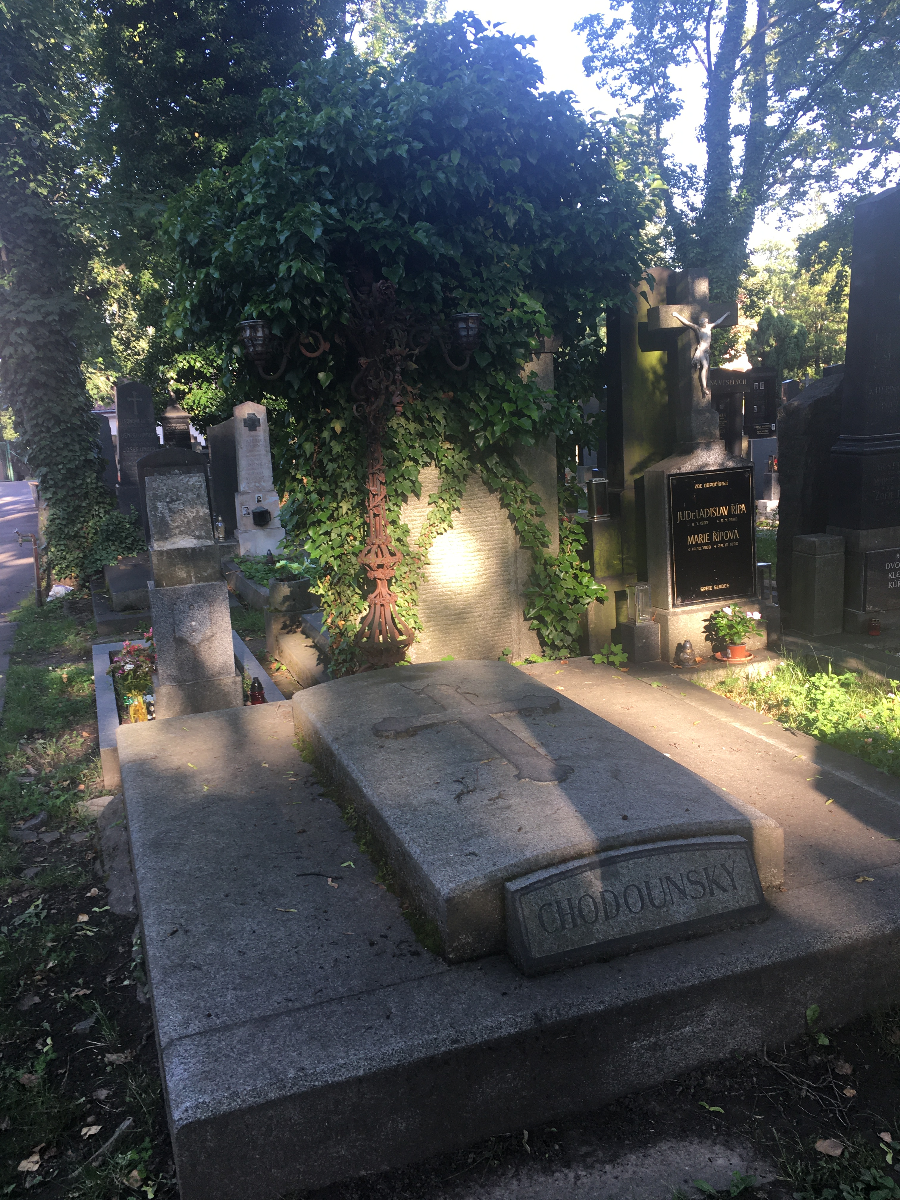 Hřbitov Malvazinky, náhrobek Chodounský